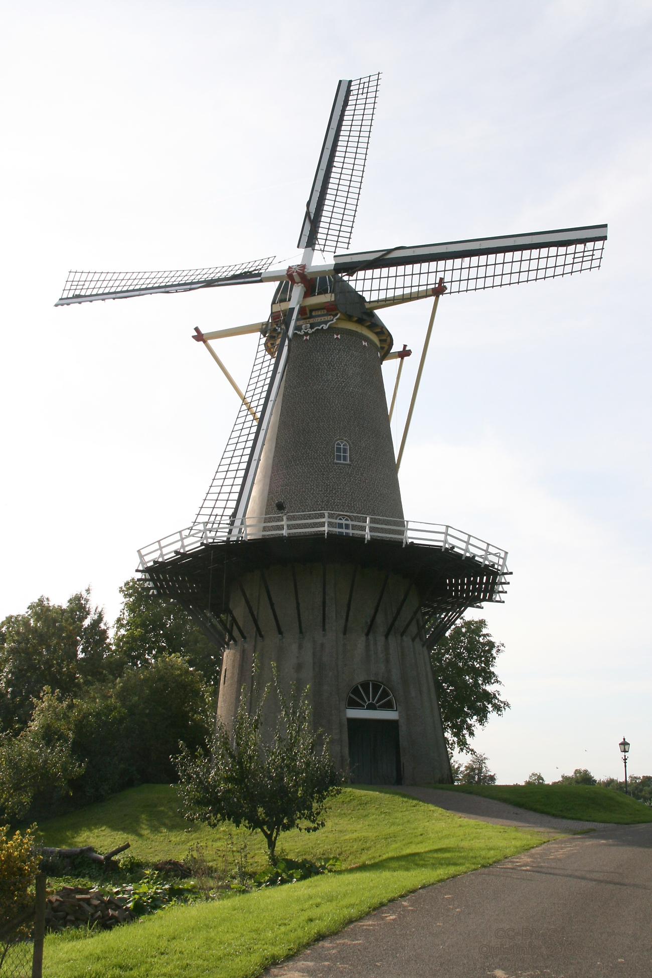 Buren (Gld): molen De Prins van Oranje